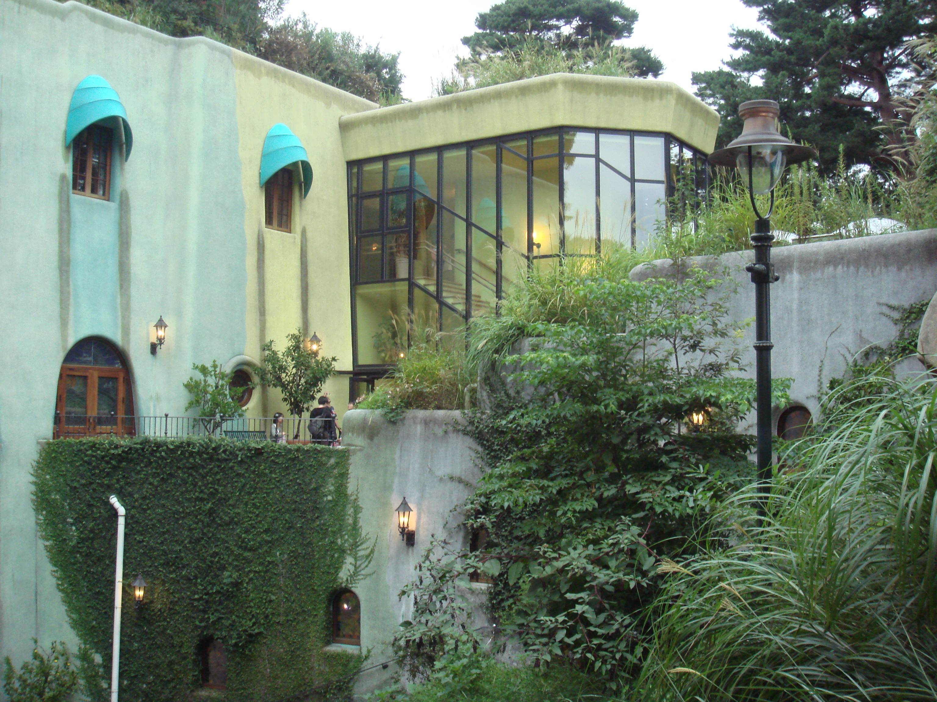 Ghibli Museum, Tokyo, Mitaka.